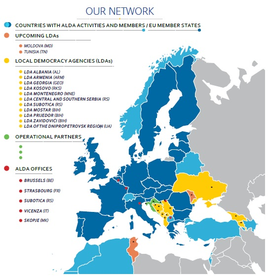 Our Network_ALDA